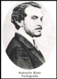 Retrato de Saturio Rios, anterior a 1900.